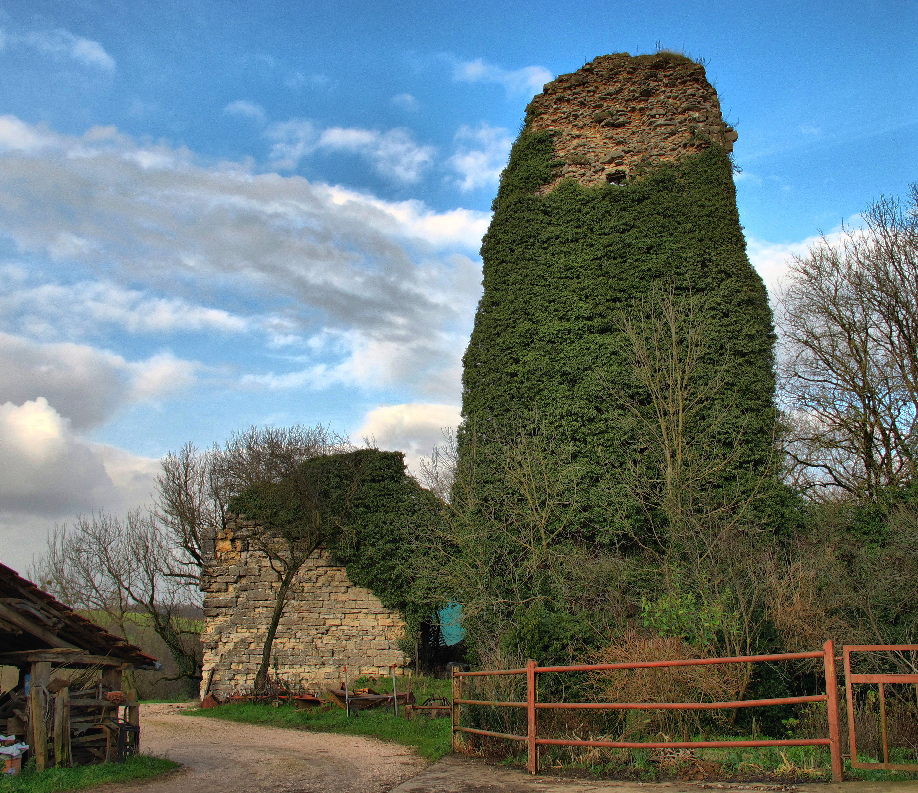 Inscrit aux monuments historiques sous le numéro : PA00101632